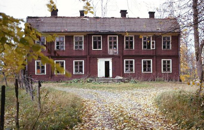 Lissma gård huvudbyggnad i förfall